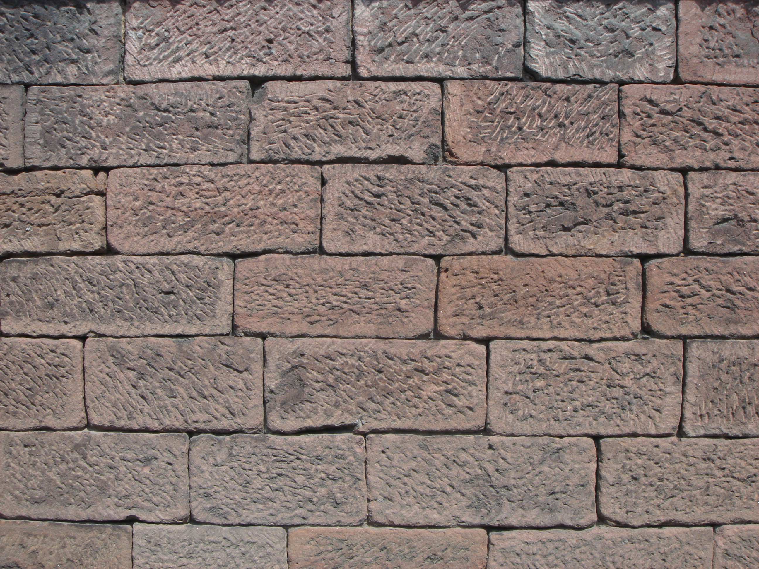 Mauerwerk-regelm